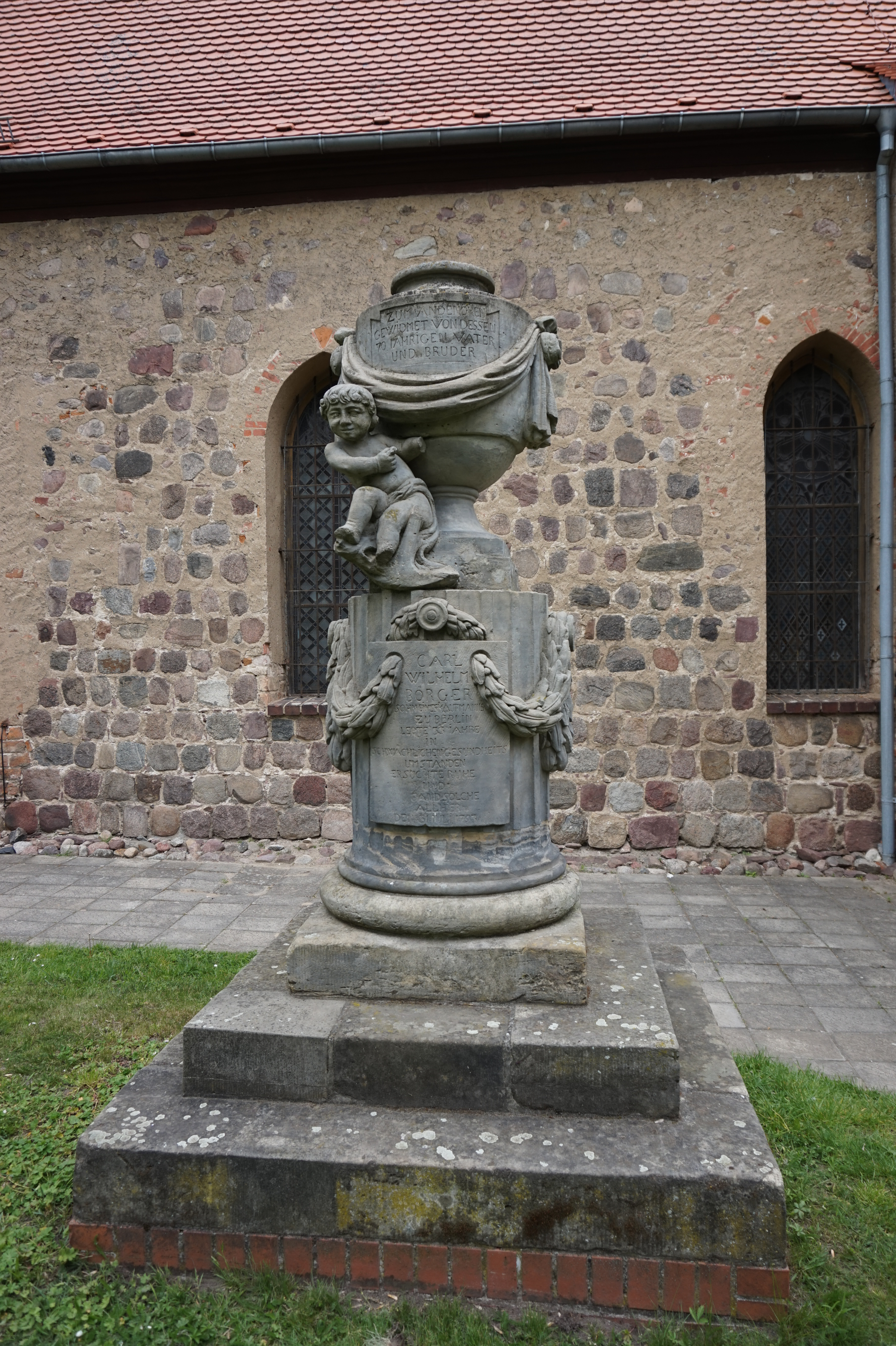 Urnengrabmal im Zopfstil für Carl Wilhelm Börger an der Dorfkirche Blumberg (Ahrensfelde) Südseite